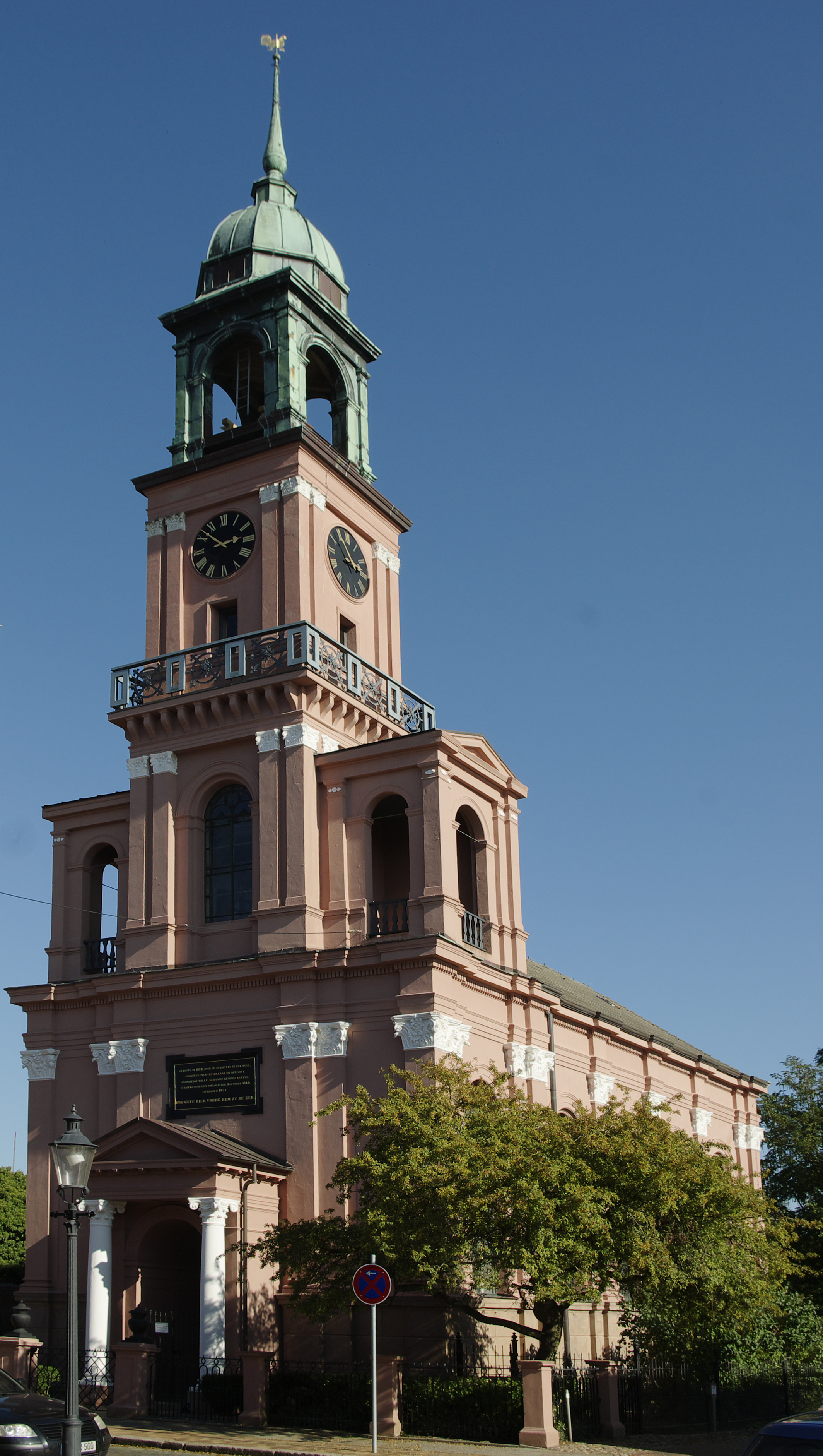 Kulturdenkmale in Friedrichstadt Nummer 69 Zähler 1